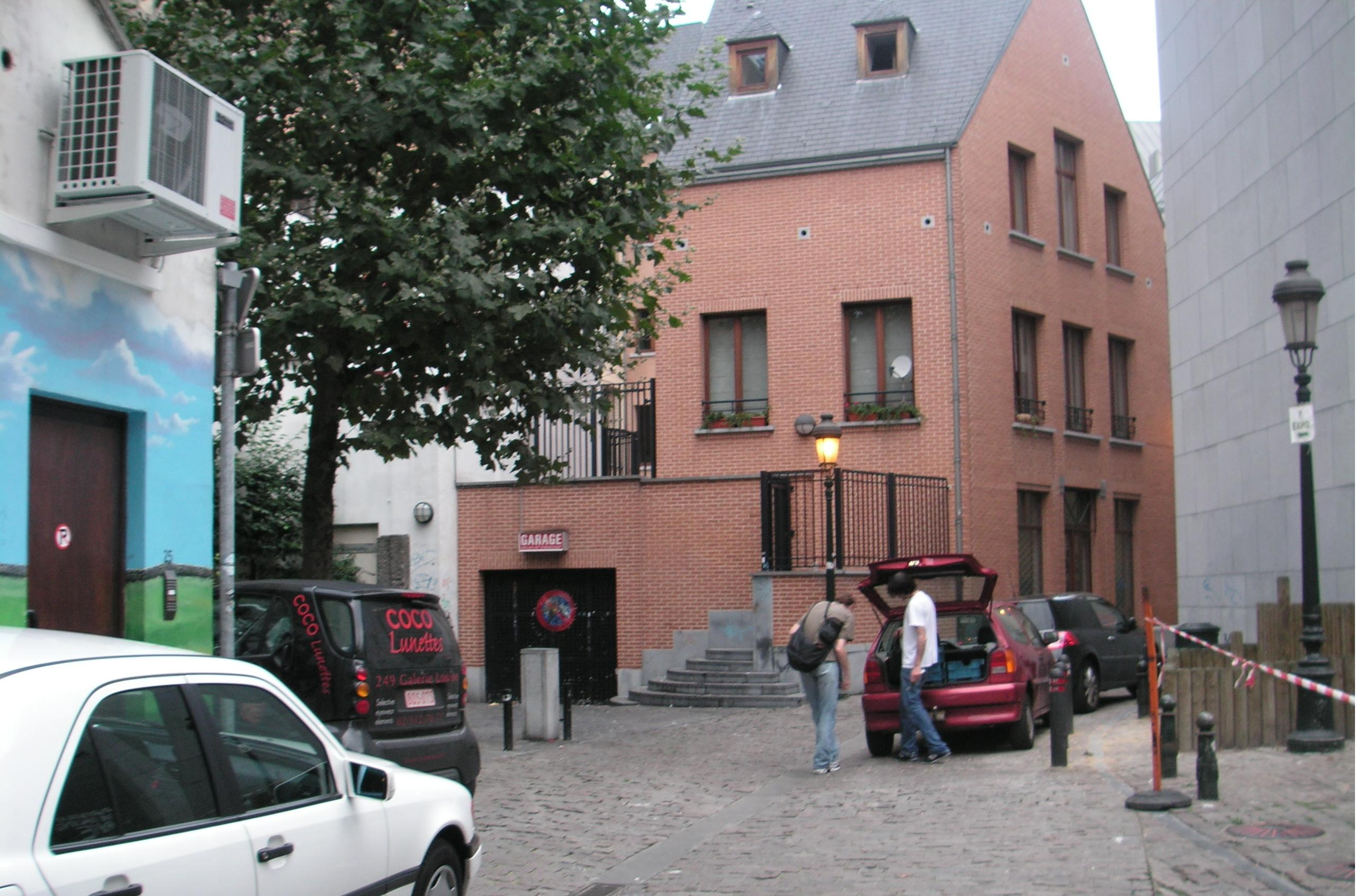 Photo van mosselgat